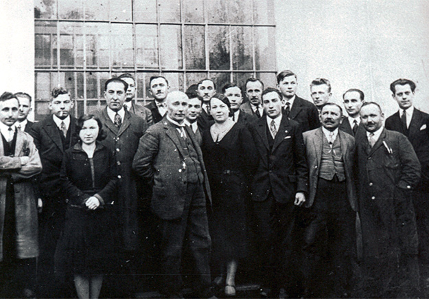 Dyrekcja i pracownicy. 1921 rok.